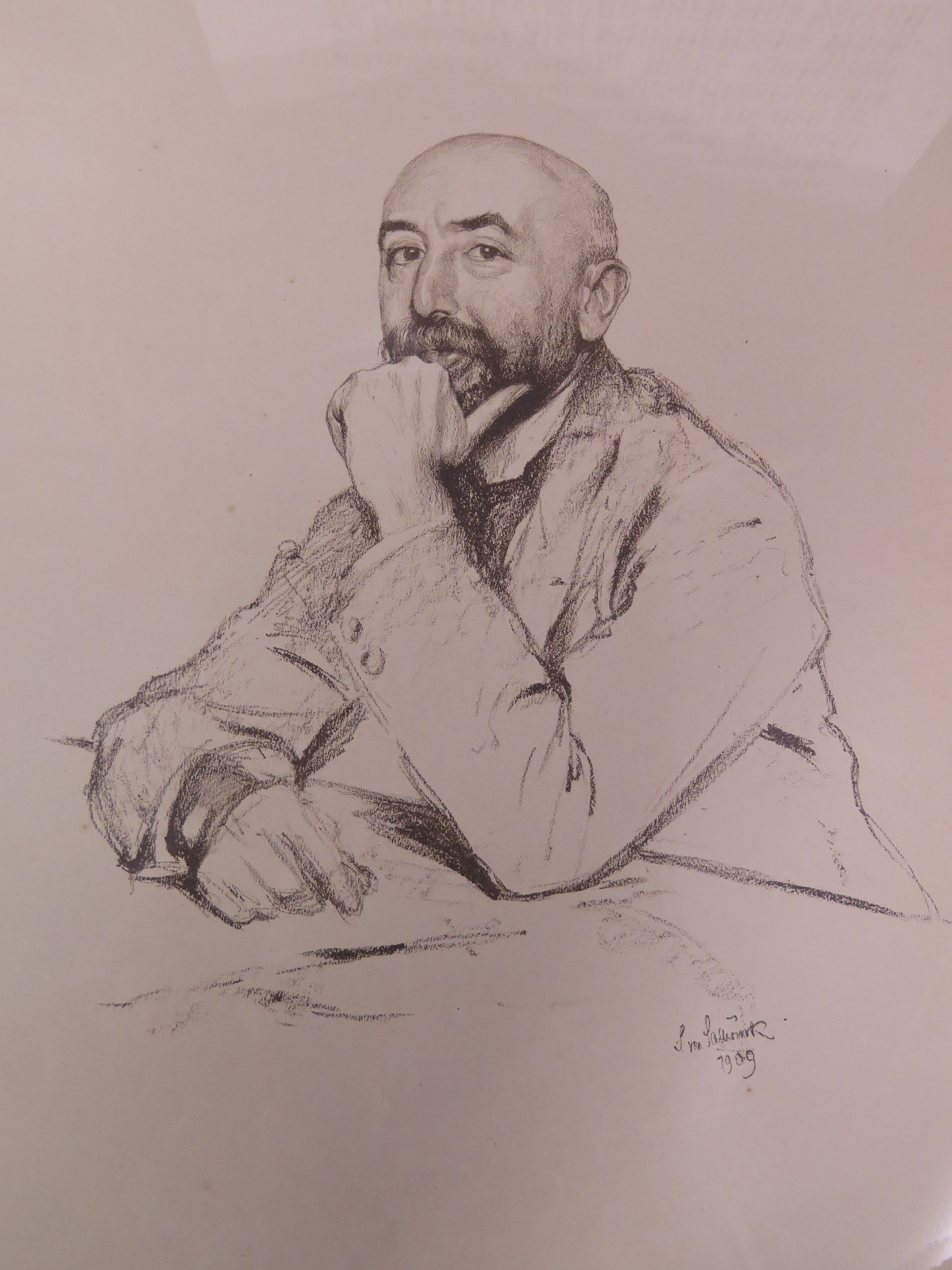 Ernst Sigmund von Sallwürk: Porträt von Adolph Goldschmidt, 1909 (Kohlezeichnung)